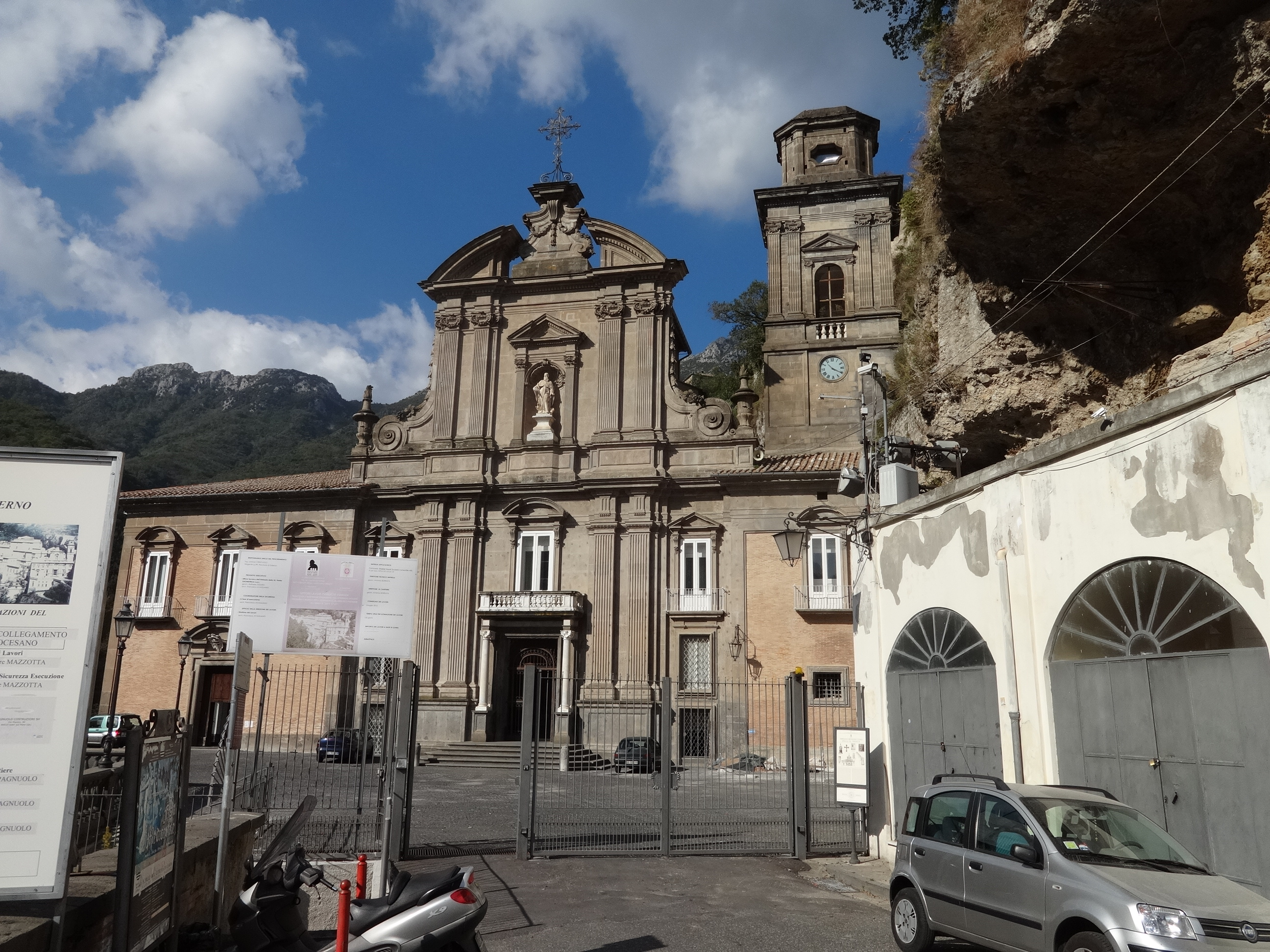 Die Abtei Santissima Trinità di Cava de’ Tirreni (lat.: Territorialis Abbatia Sanctissimae Trinitatis Cavensis) ist eine exemte Benediktinerabtei in Kampanien in der Provinz Salerno. Sie ist auch unter dem Namen Badia di Cava geläufig, da sie unterhalb einer Grotte liegt.